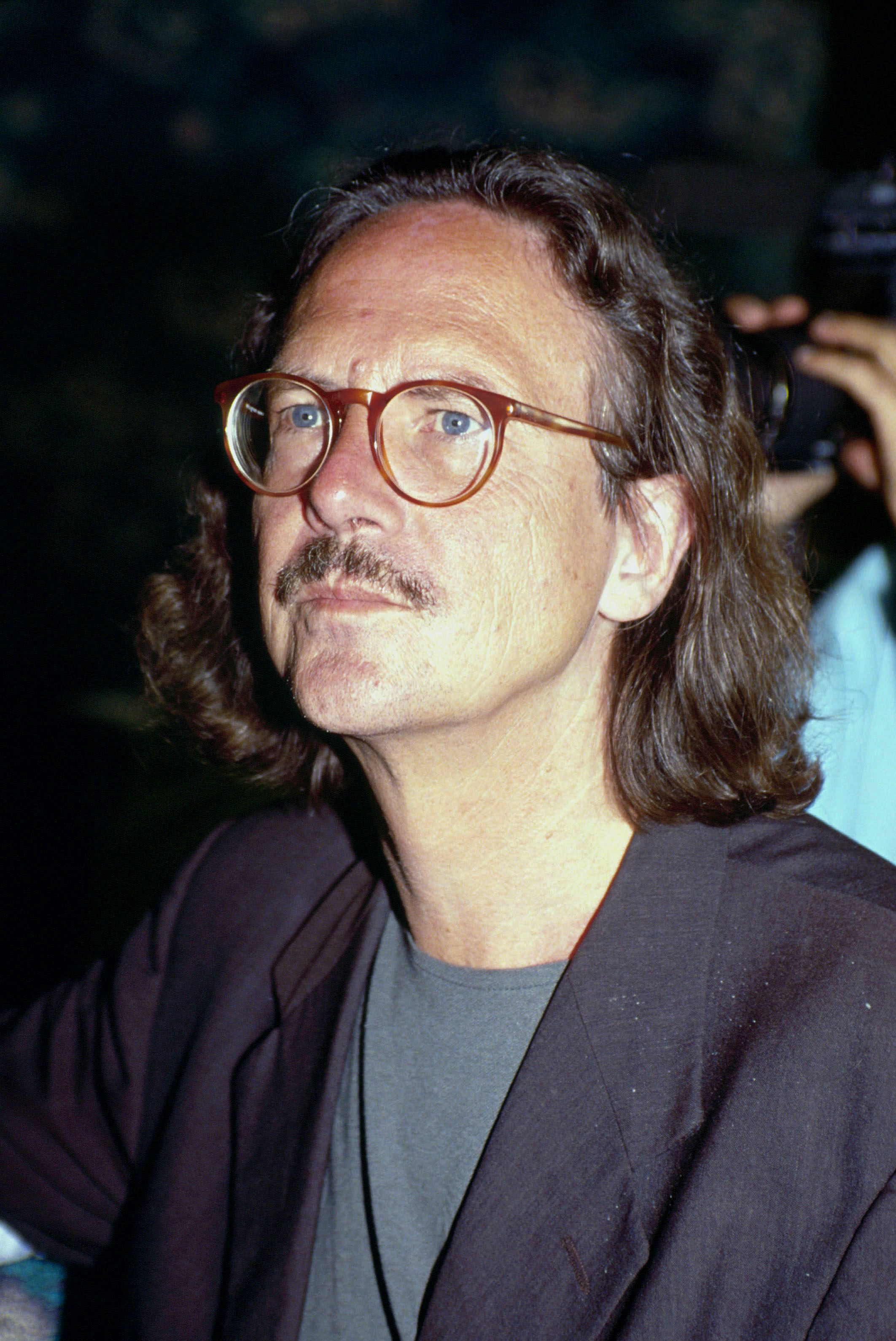 Lo scrittore tedesco Peter Handke